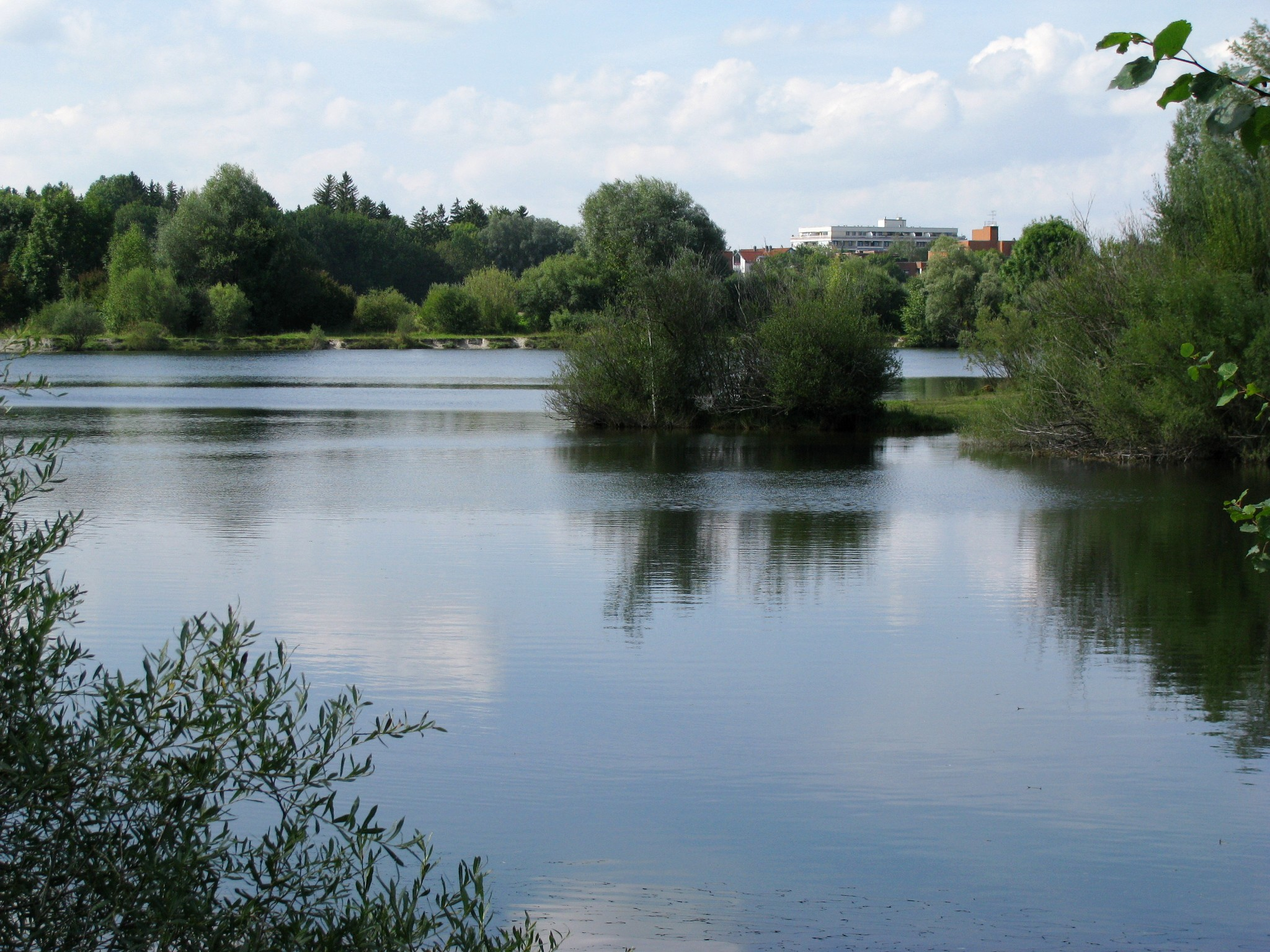 Großer Böhmerweiher von Osten